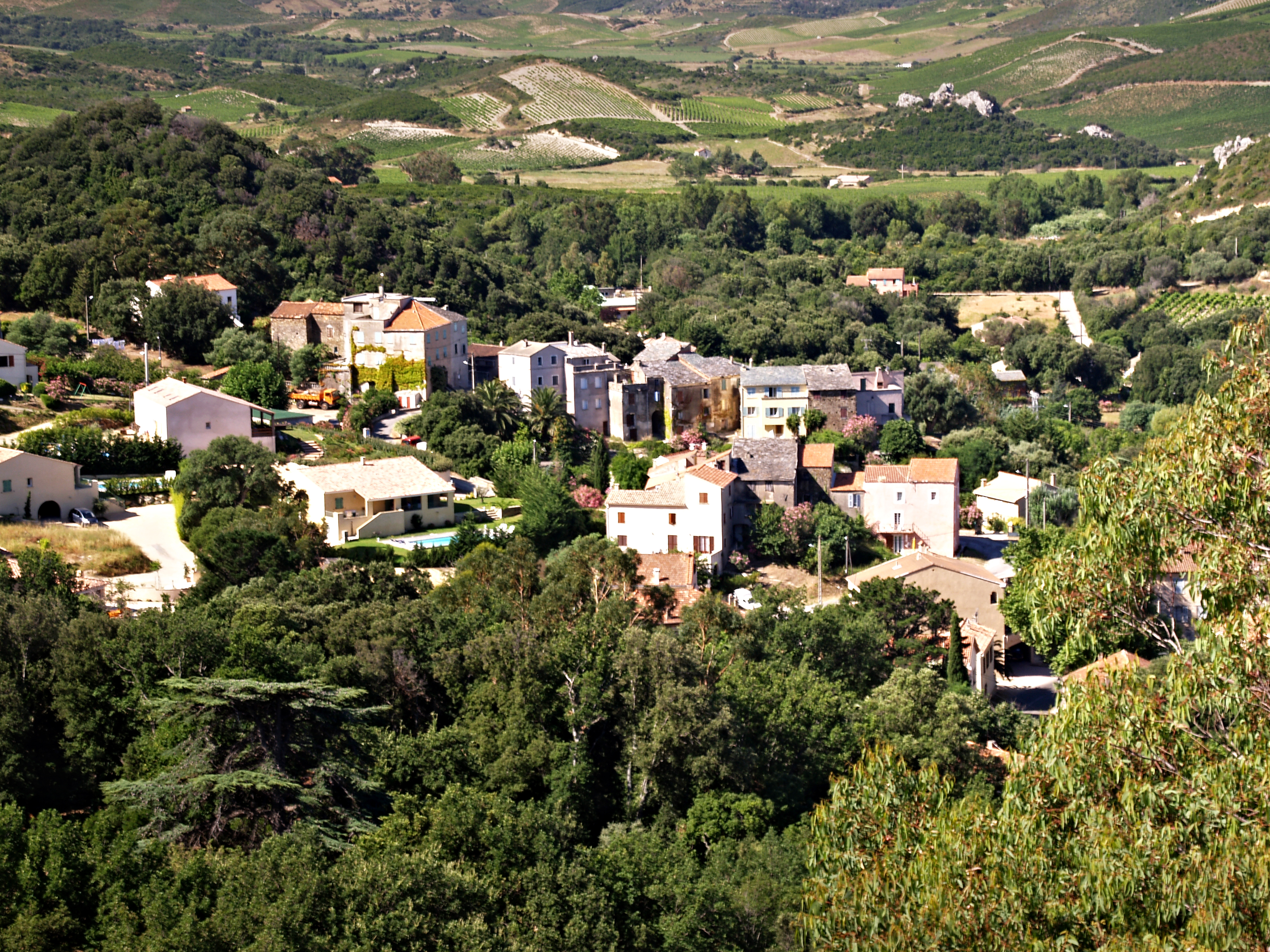 Patrimonio (Corsica) - Hameau de Santa Maria